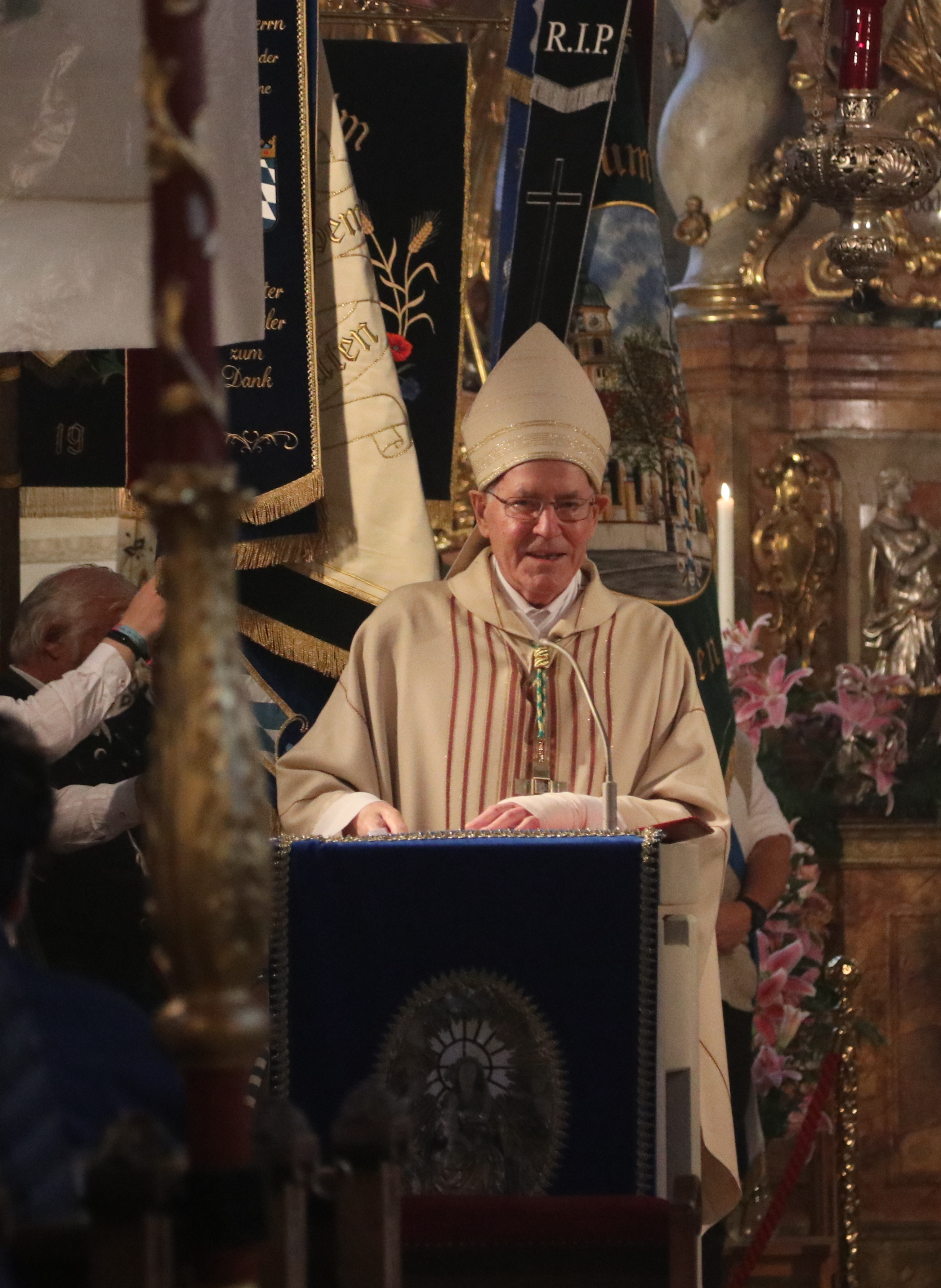 Flößerwallfahrt in Masia Thalkirchen am 2018-09-02 mit Weihbischof Emeritus Franz Dietl.